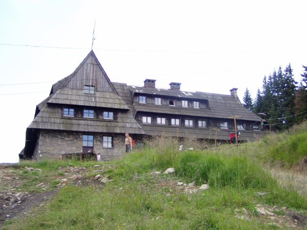 Schronisko PTTK na Turbaczu